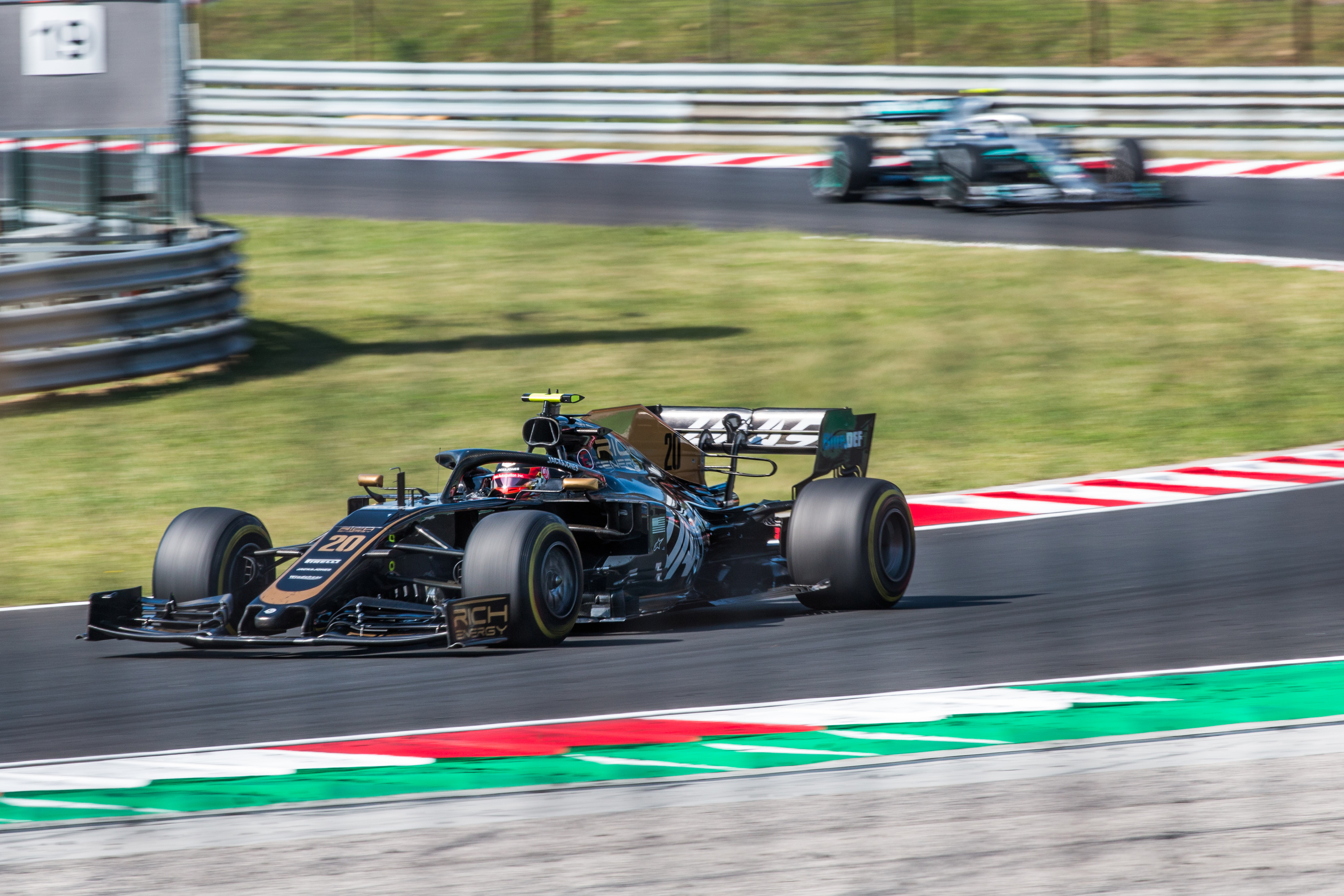 Kevin Magnussen in his Haas VF-19 during Formula 1 Hungarian Grand Prix 2019 on the Hungaroring